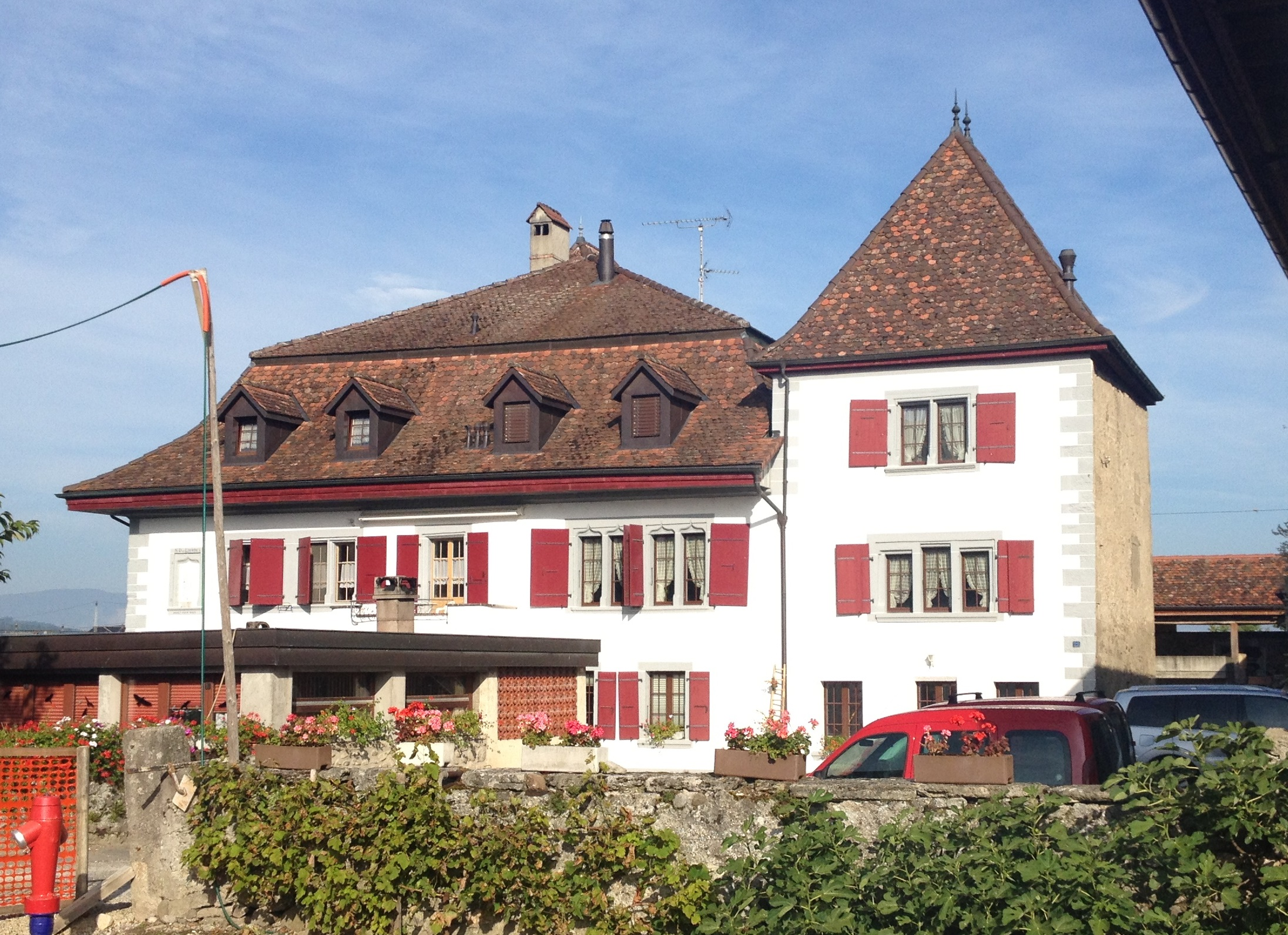 Le château de la Cour à Cugy, dans le canton de Fribourg en Suisse.